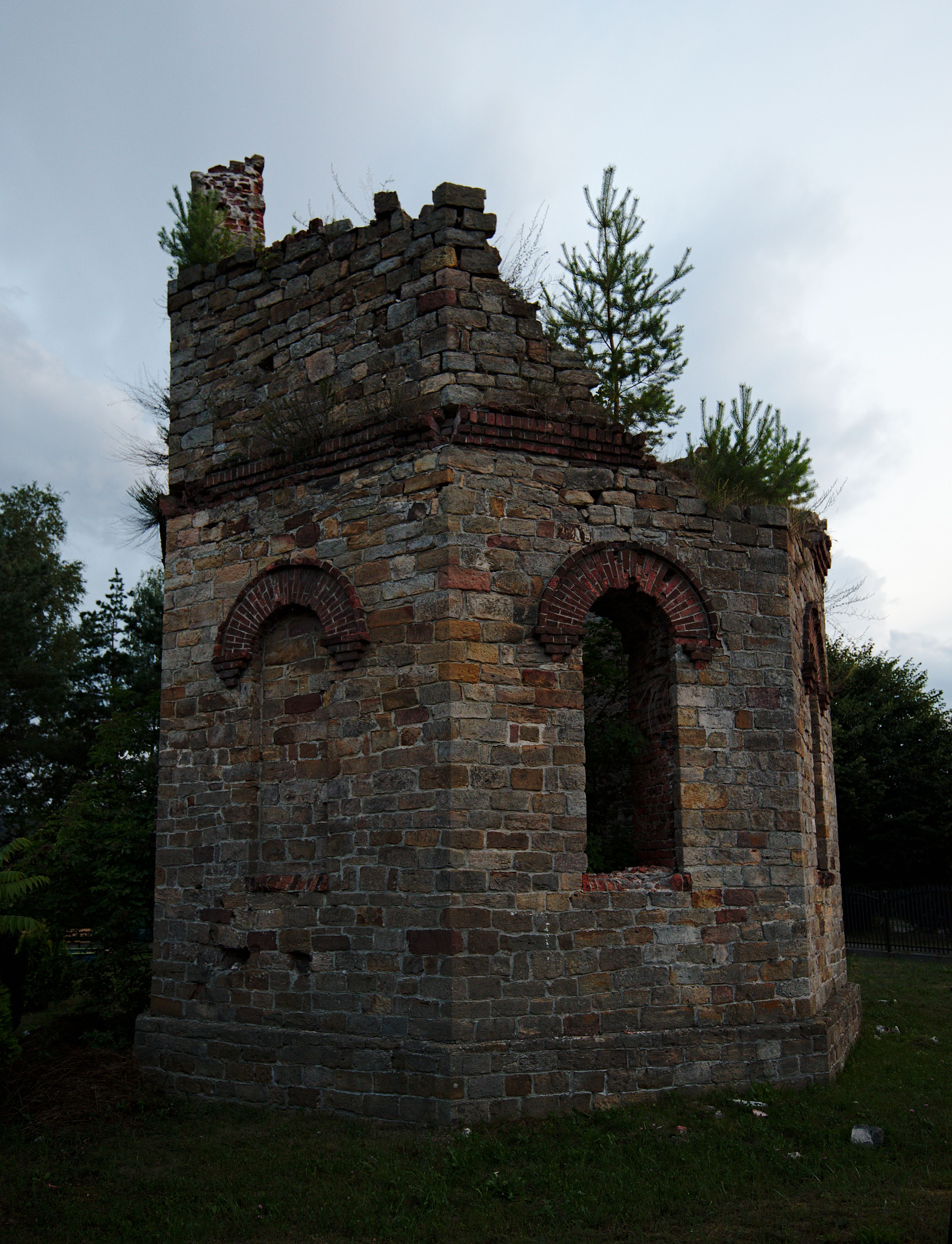 Ruiny wieży ciśnień w Bliżynie, będącej częścią stalowni z XIX w.